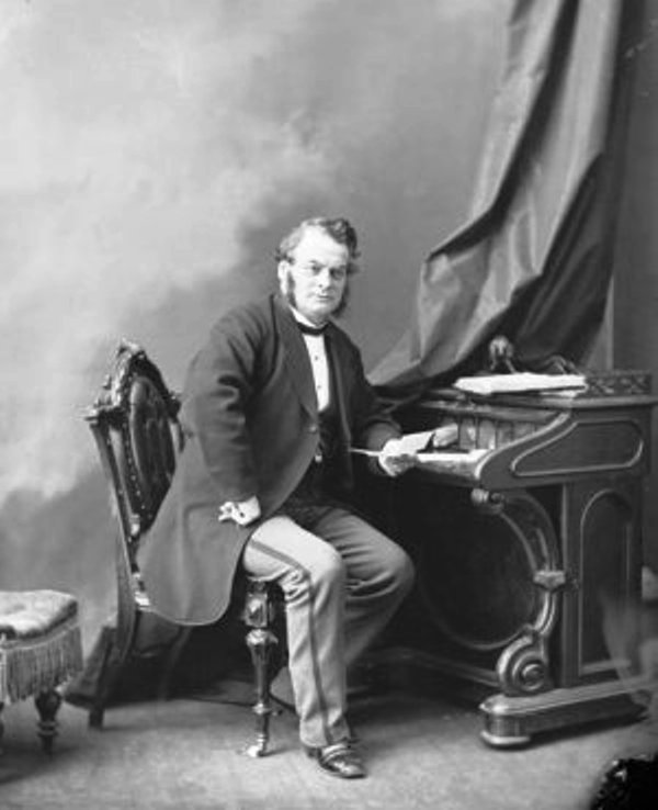 L'honorable Samuel Leonard Tilley, député; Saint-Jean(N.-B.); février 1869.